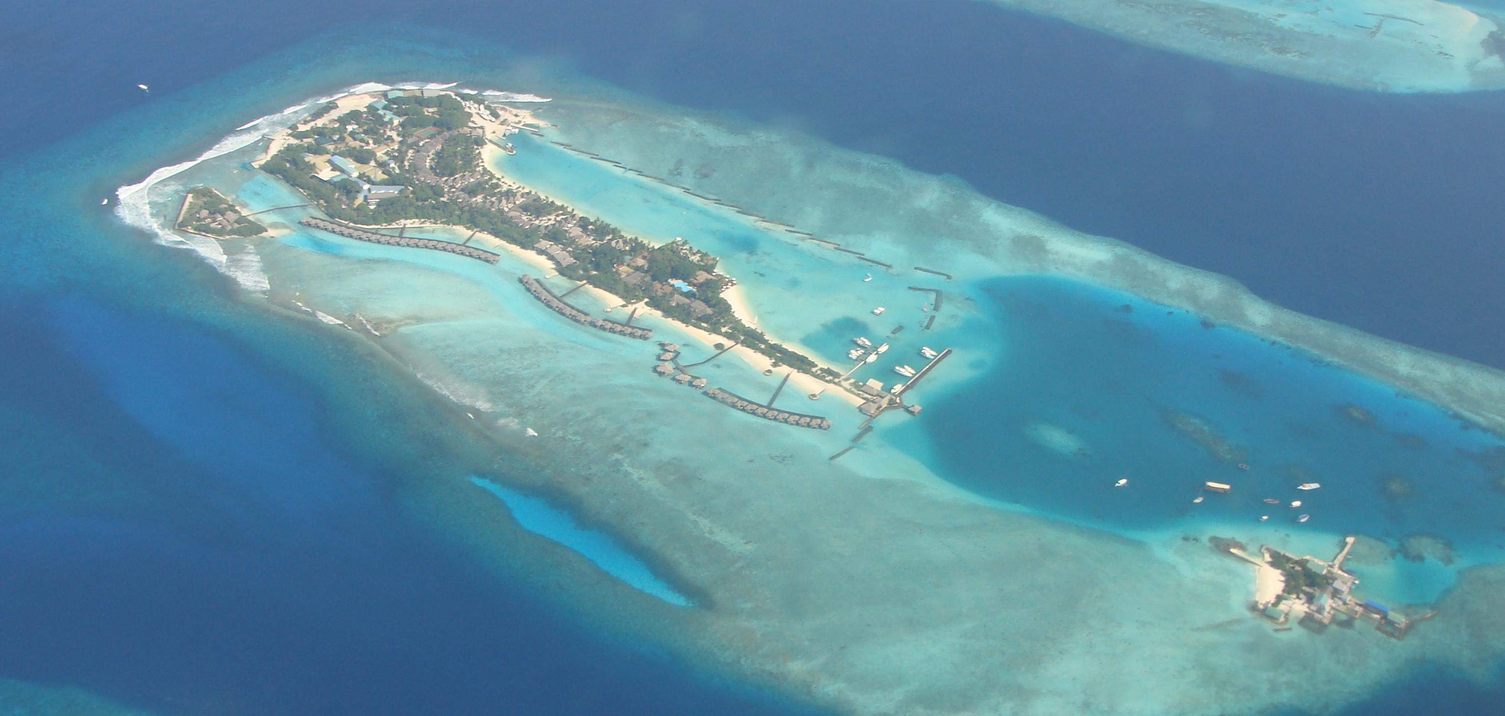 Furan-nafushi Island